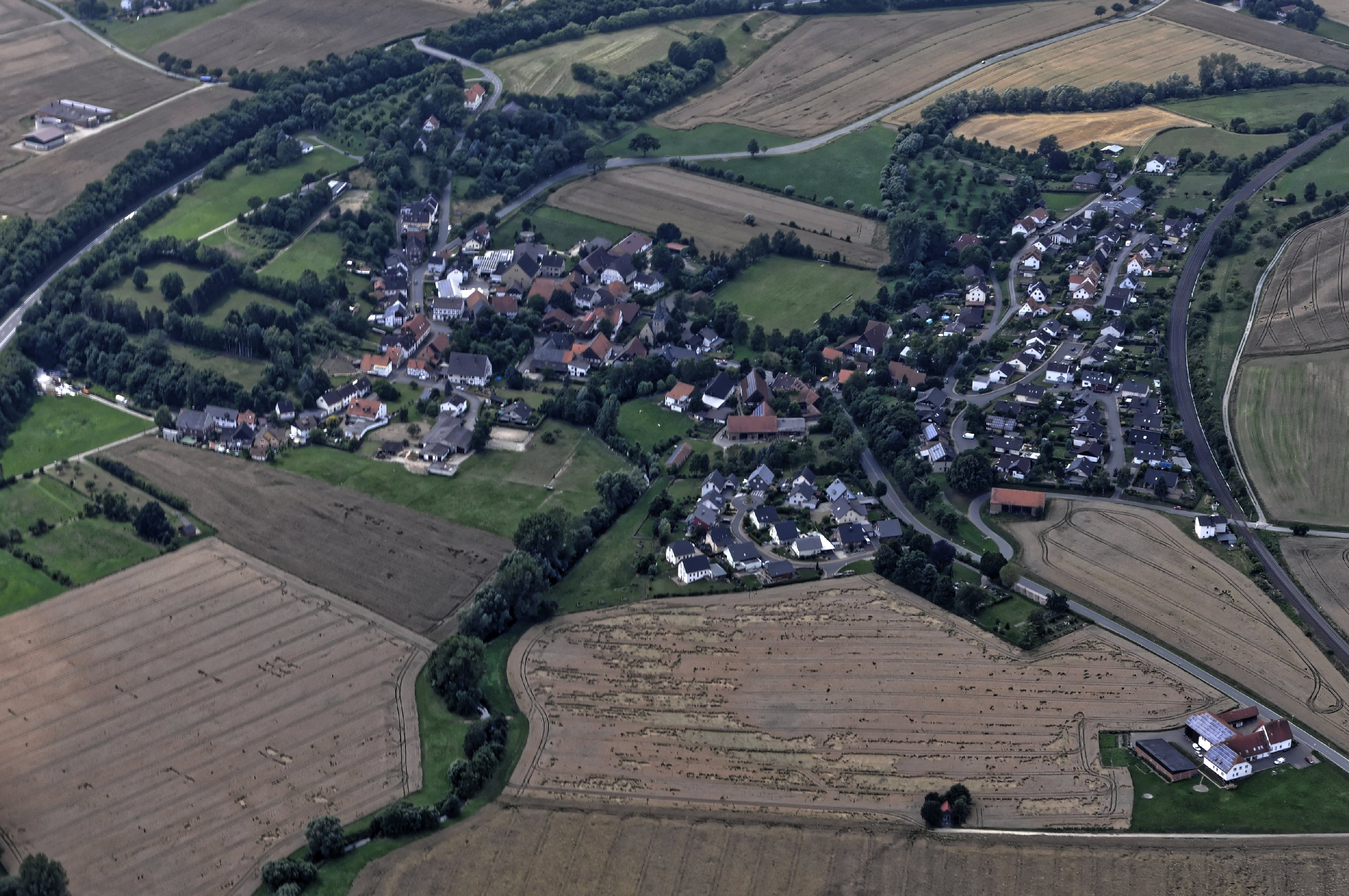 Bilder vom Flug Nordholz-Hammelburg 2015: Brakel-Riesel